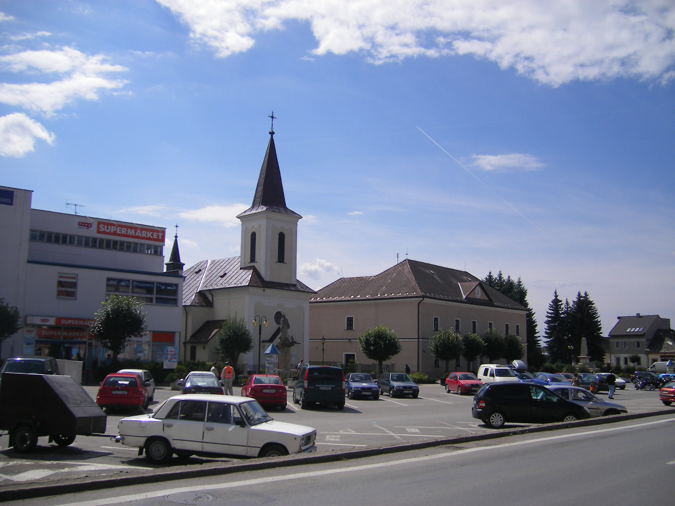 Trstená, Hlavné námestie